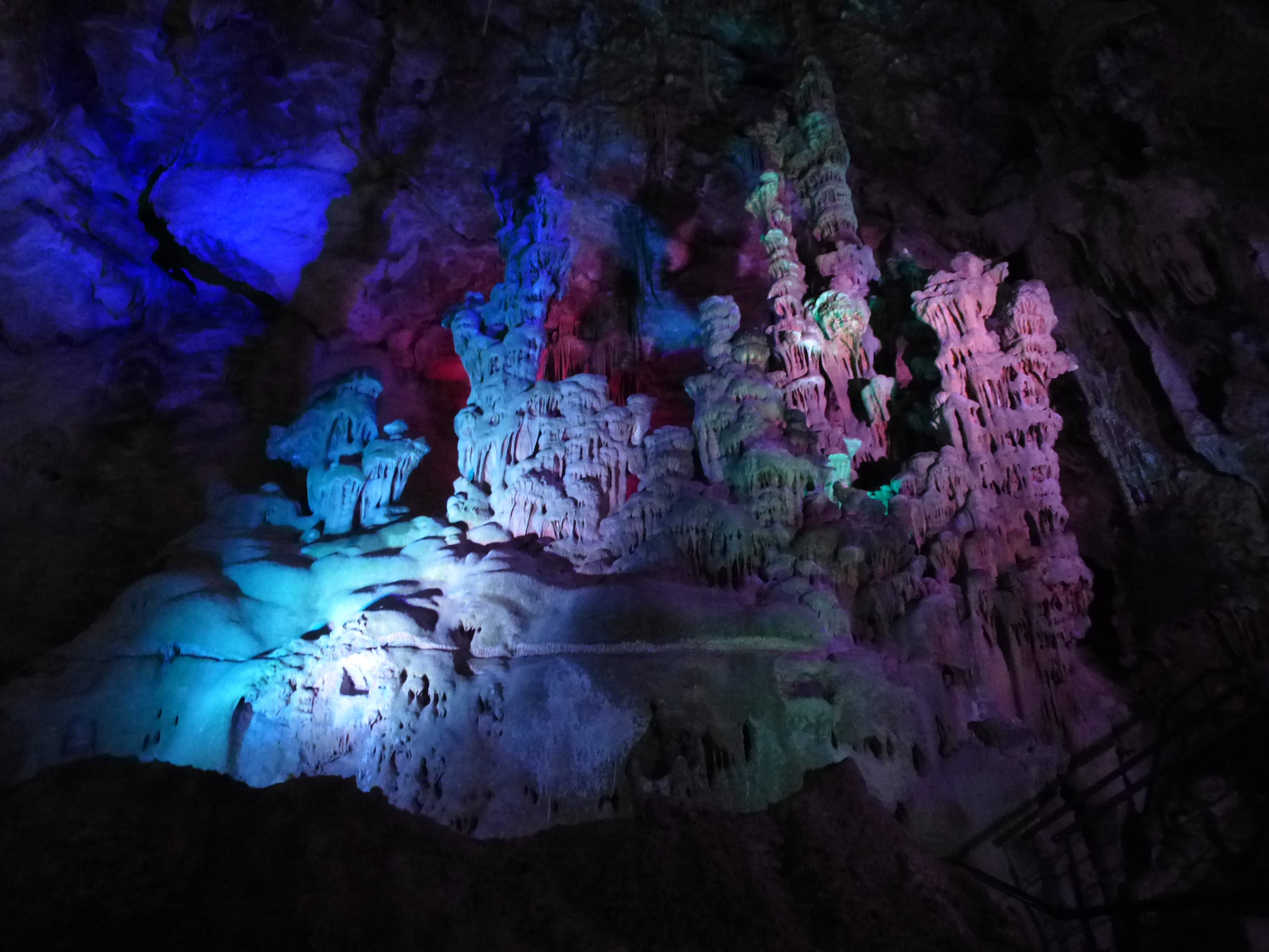 la grotte de canelobre